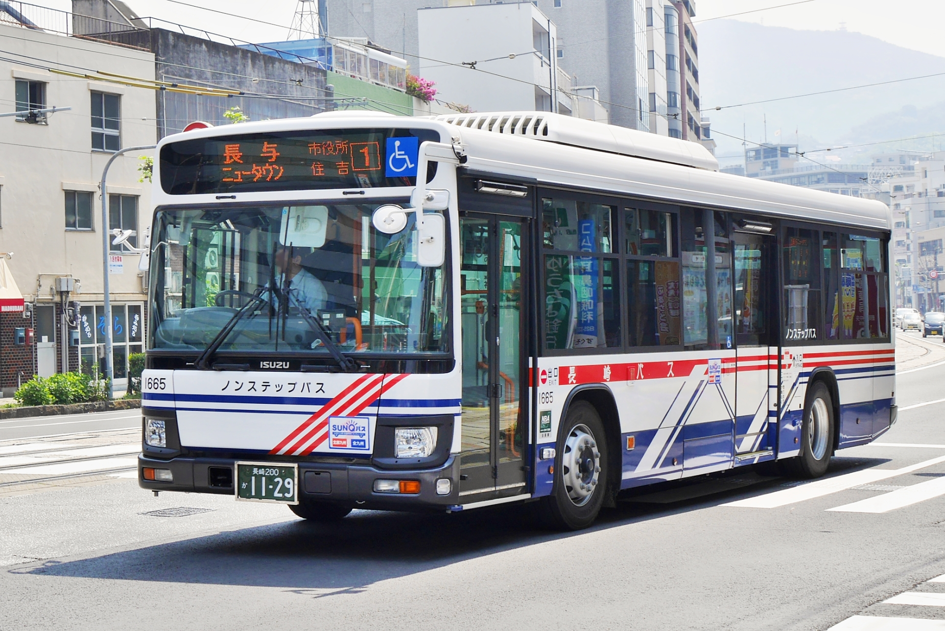 長崎バス（長崎自動車）のいすゞ・エルガ（2代目）。車体番号1665。